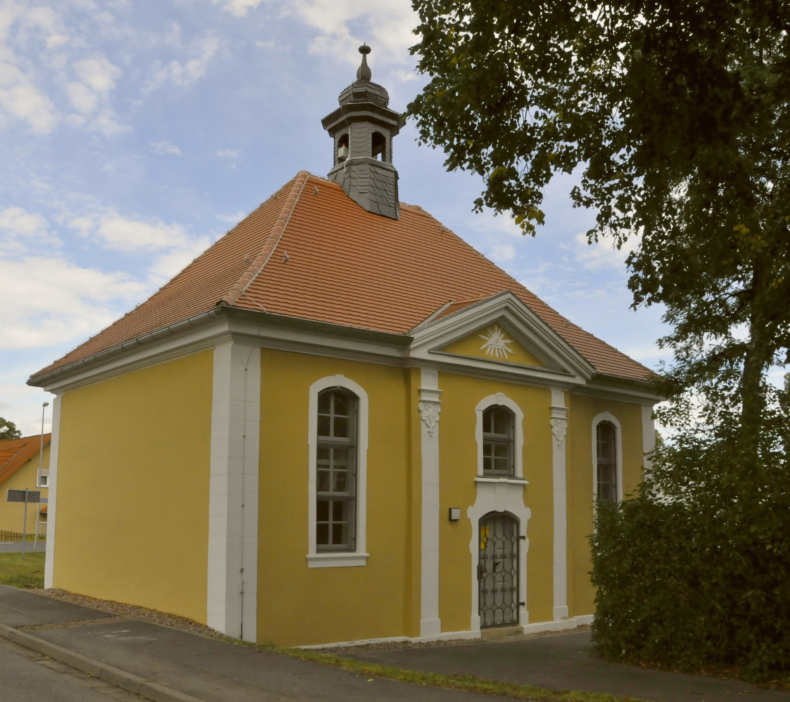 Ohrdruf, Siechhofkirche